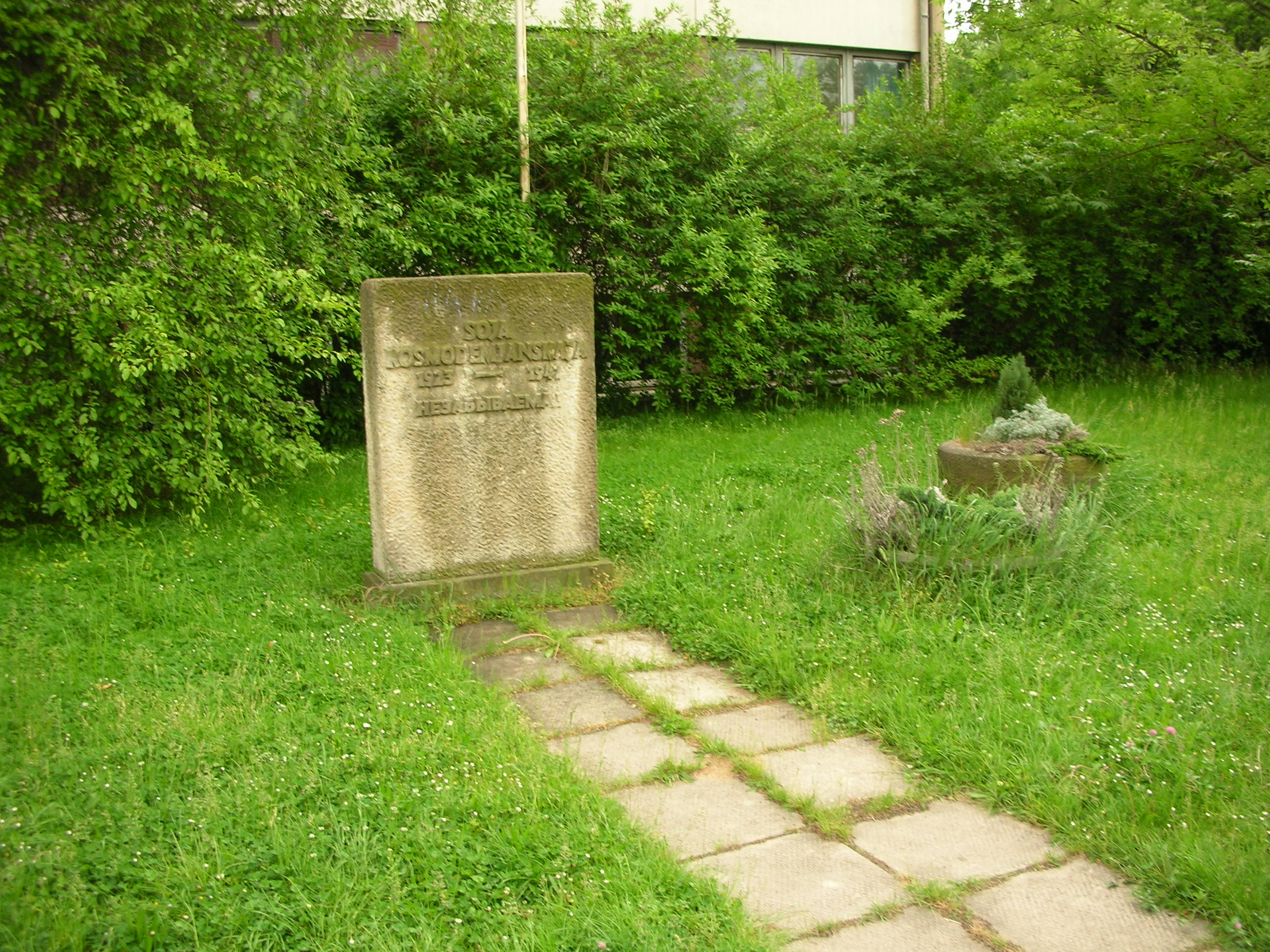 Soja-Kosmodemjanskaja-Gedenkstein Dresden, vor der 46. Oberschule, commemorative plaque